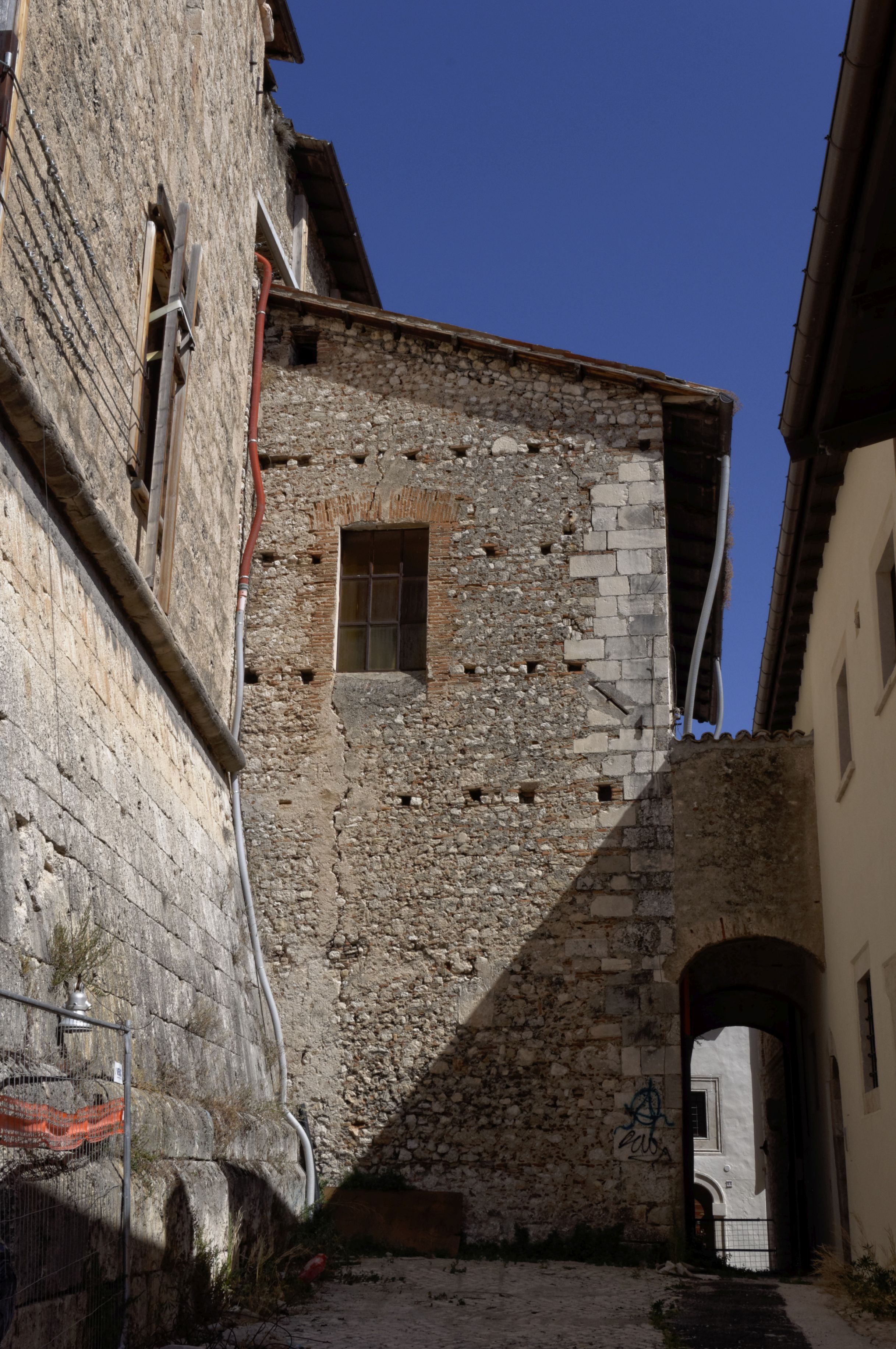 L'Aquila 2017 Dieses Foto entstand in Zusammenarbeit mit Stadtbesichtigungen.de Die Seiten Stadtbesichtigungen.de, der dazugehörige Reise Blog sowie die Facebookseite: Stadtbesichtigungen Rom dürfen dieses Bild für Ihre Veröffentlichungen ohne den Hinweis auf Wikipedia, Commons bzw der Lizenz verwenden. Die Verantwortlichen habe von mir (Ra Boe) die Originaldaten zur freien Verfügung übermittelt bekommen.